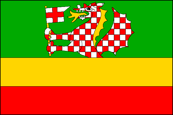 vlajka, Jiřice u Moravských Budějovic, okres Znojmo